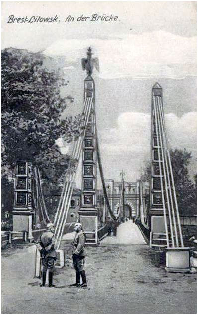 Цярэспальская брама. 1915—1918 г.